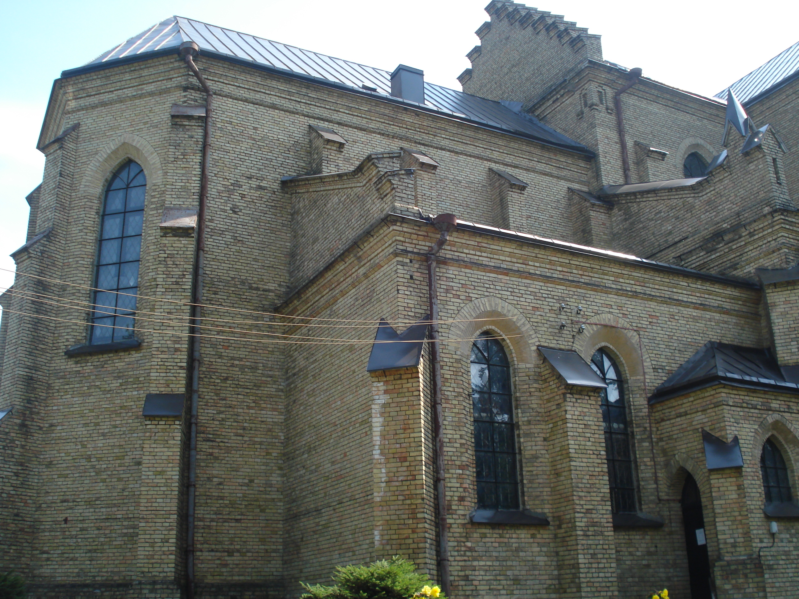 Church of St. Casimir (Švento Kazimiero Naujosios Vilnios bažnyčia) in Naujoji Vilnia (Palydovo g. 15)